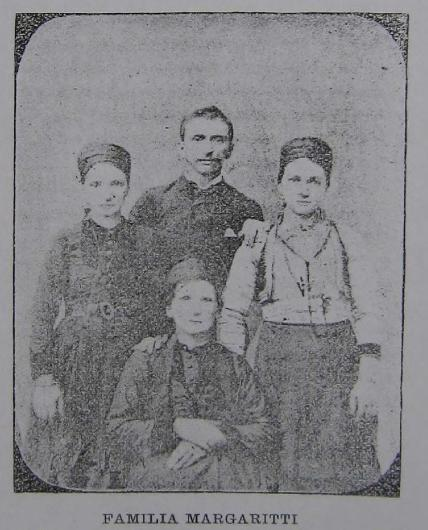 Семейството на Апостол Маргарит, Македонорумънски алманах, 1902